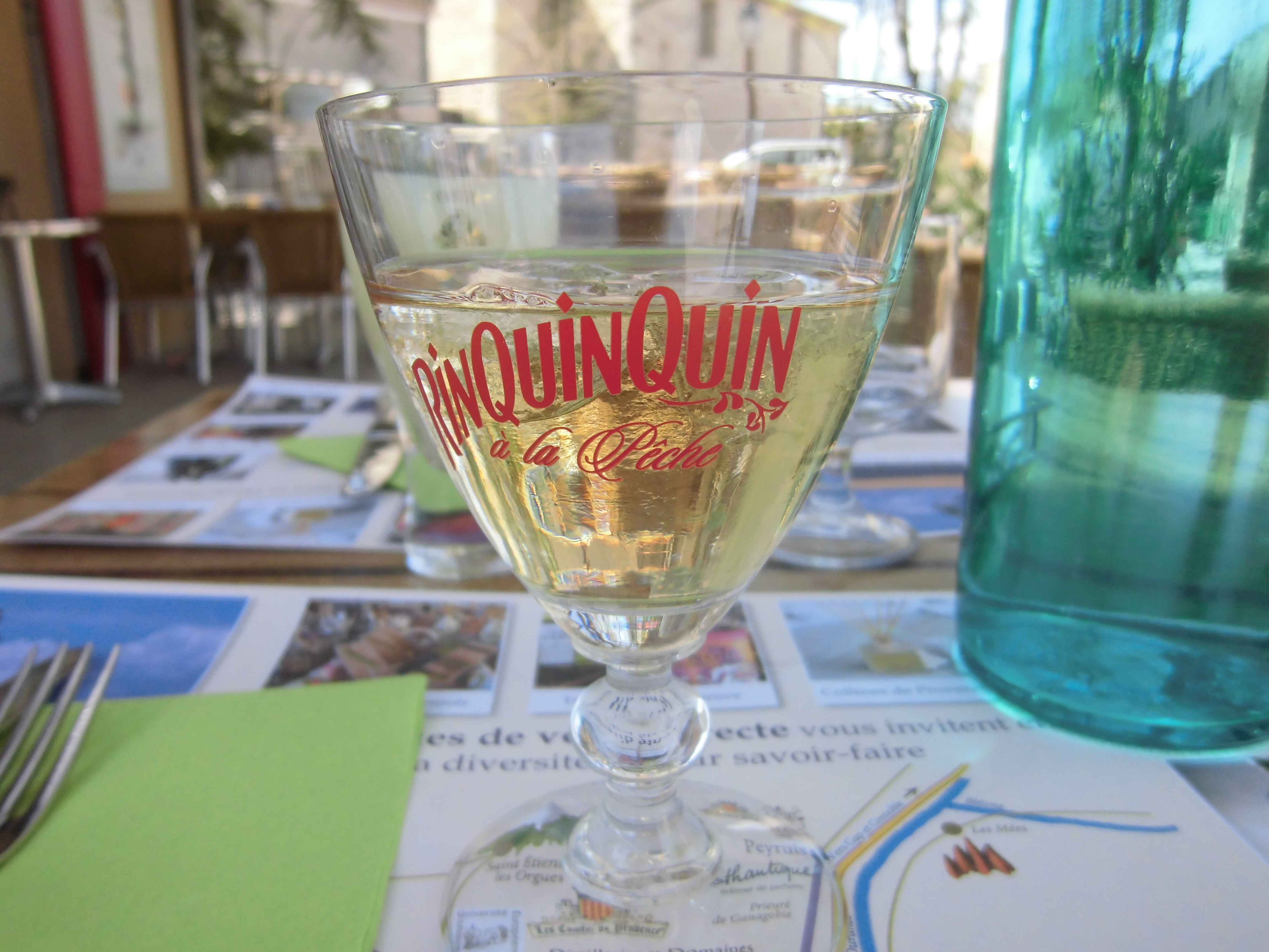 vin de pêche au Bistrot de Pays de Niozelles